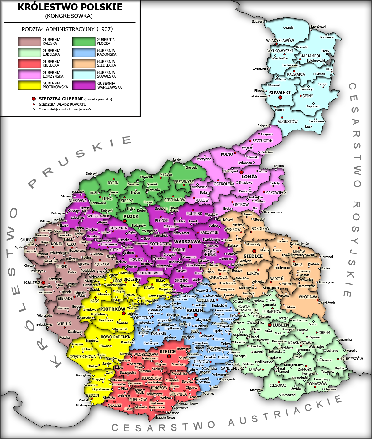 Podział administracyjny Królestwa Polskiego z roku 1907. Autor: Qqerim Administrative map of Poland from 1968. Made by Qqerim.